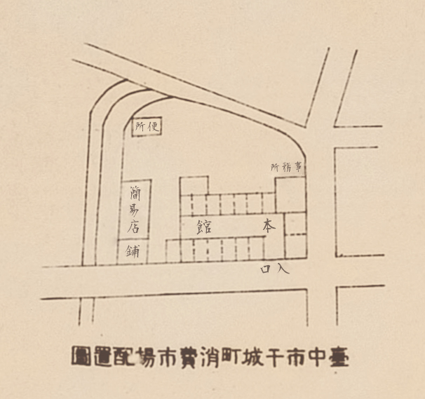 中文（台灣）: 台中市干城町市場為原台中第四市場